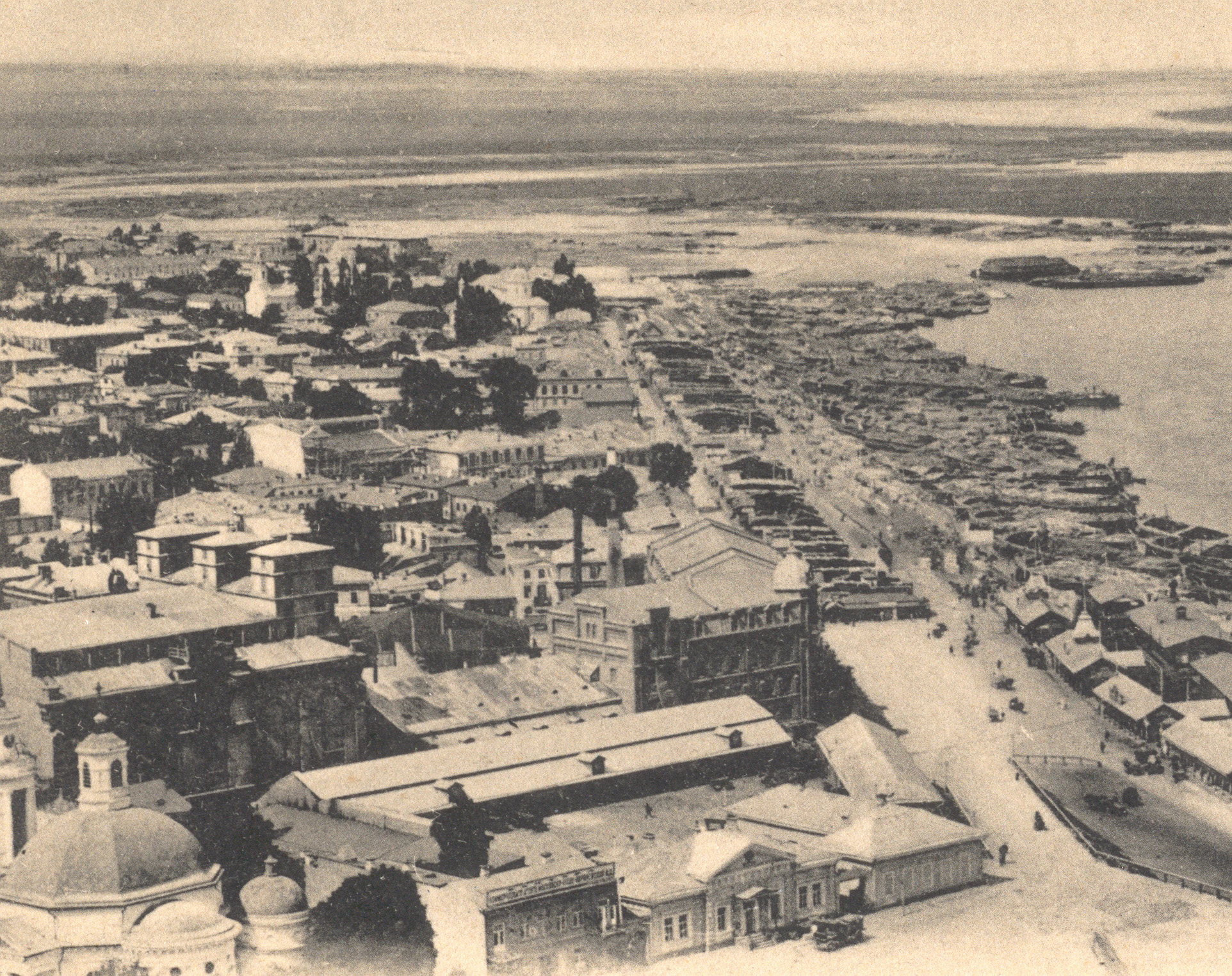 Kiev, «Lazar Brodsky» flour mill